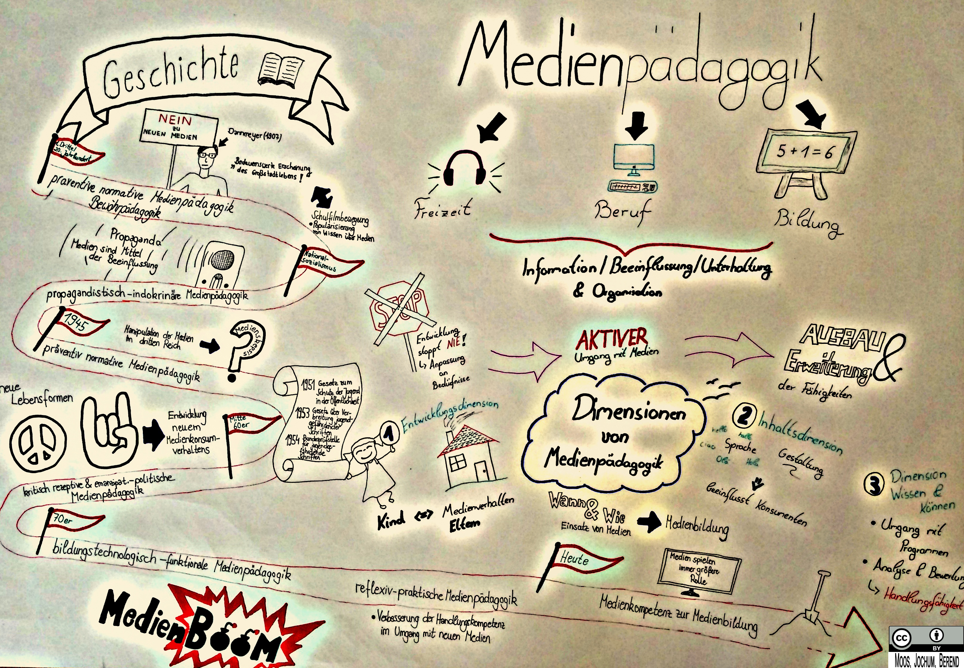 Diese Sketchnote entstand im Seminar OERlabs im SS 2017 an der TU Kaiserslautern und behandelt Begriff und Geschichte der Medienpädagogik.